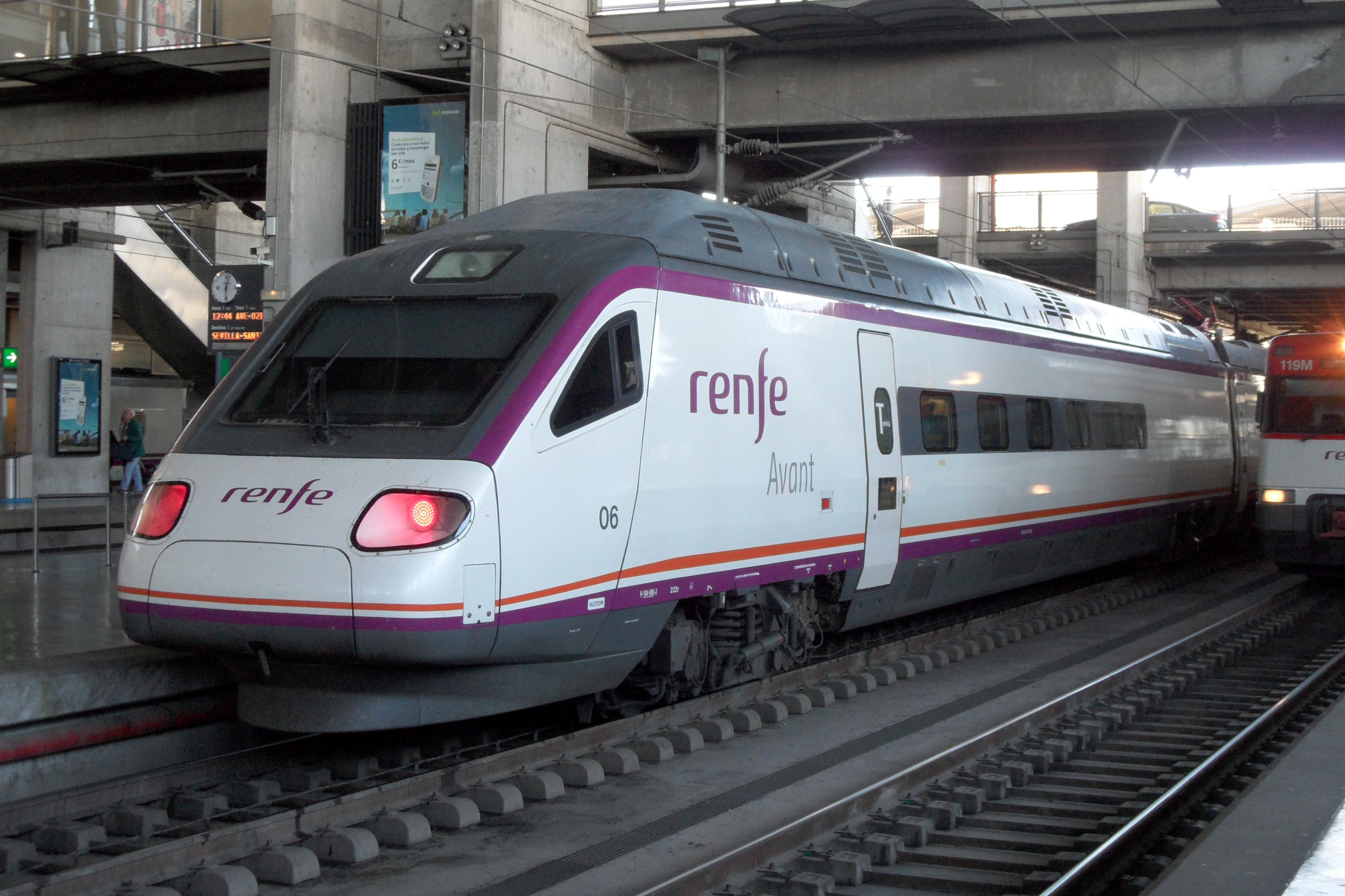 Endwagen einer Einheit der Renfe-Baureihe 104 auf Regelspur in der Bahnhofshalle von Córdoba C.